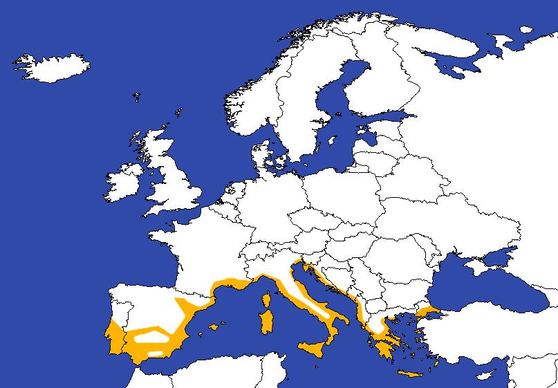 Europe du sud, culture de l'olive